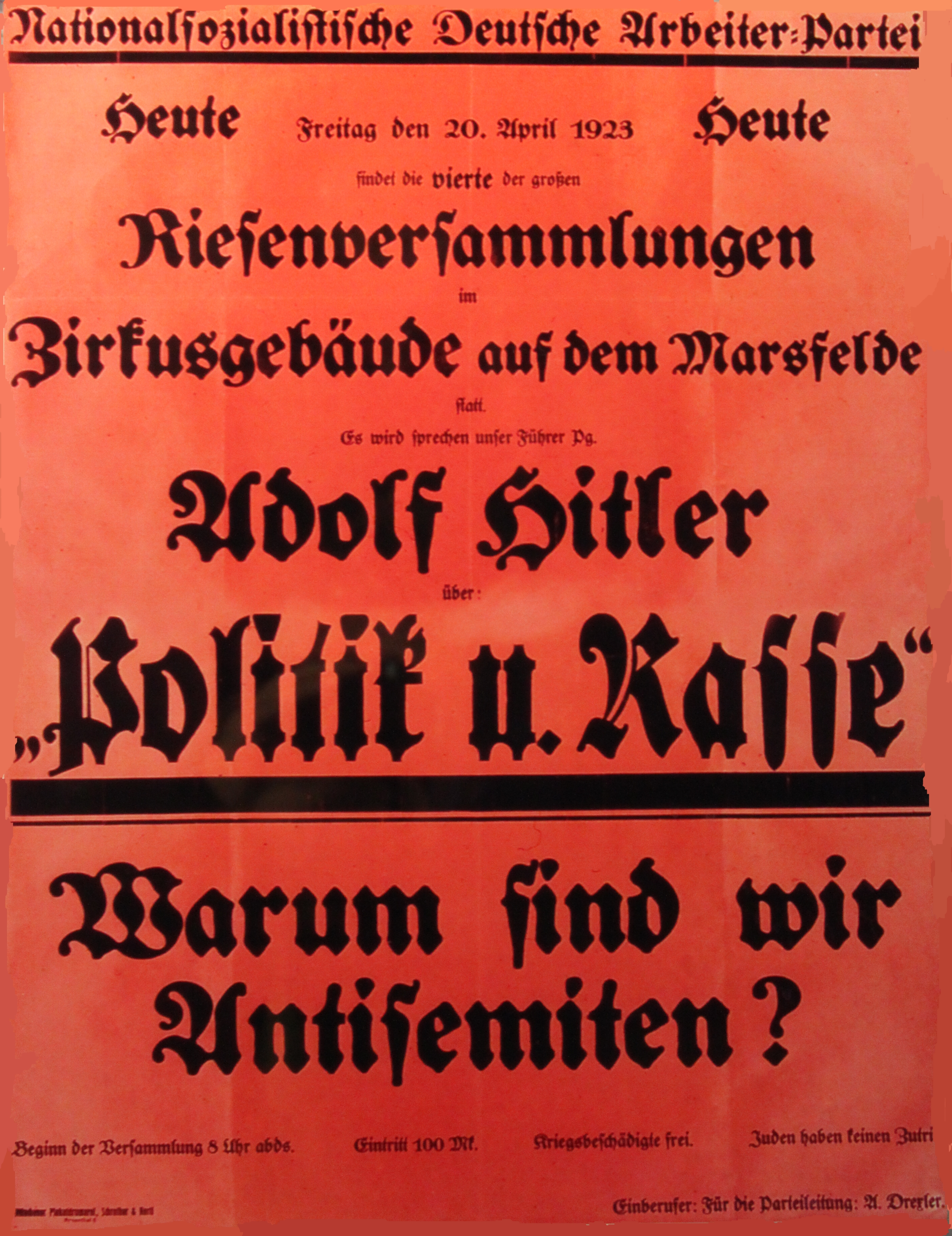 Einladung zu einer antimsemitischen Veranstaltung mit Adolf Hitler als Redner, 20. April 1923, München Marsfeld. Ränder des Plakates geringfügig elektronisch restauriert.